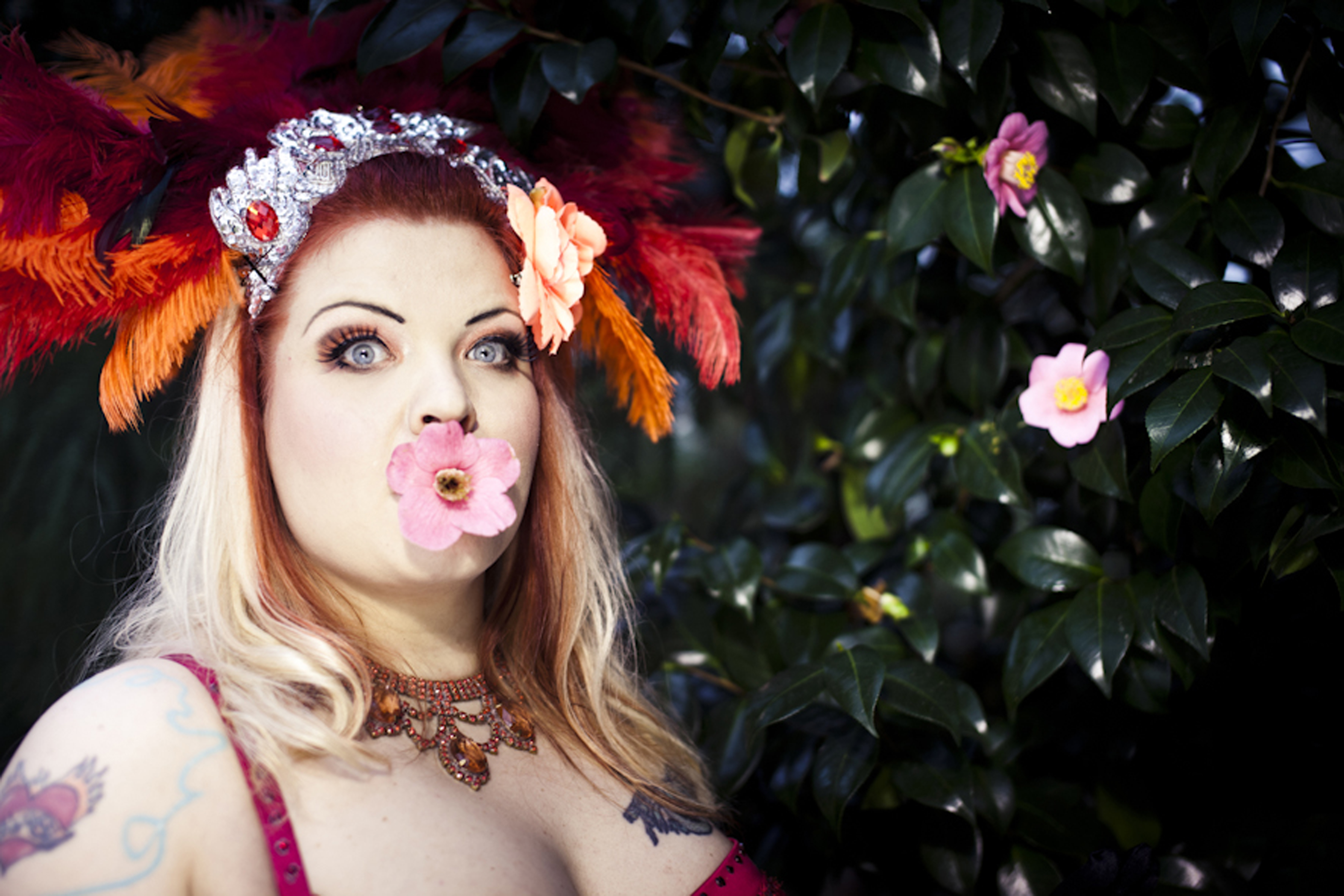 Petra Innanen/Bettie Blackheart /Kuva Jirina Alanko